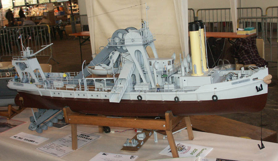 Maquette van een emmerbaggermolenschip. eigen foto